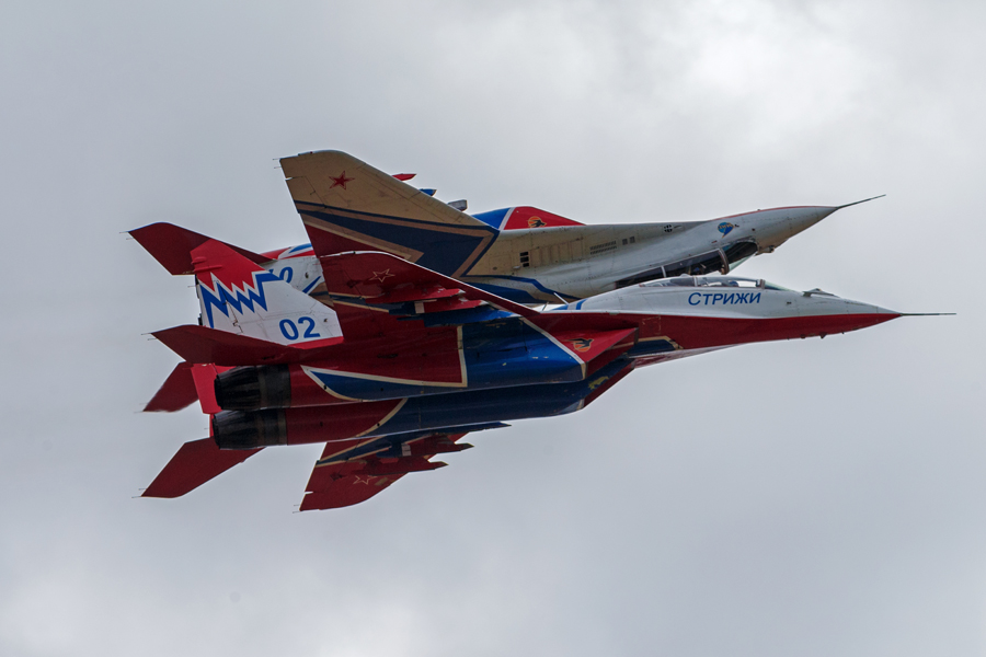 Выступление пилотажных групп в рамках Международного военно-технического форума «Армия-2016». 7 сентября 2016.